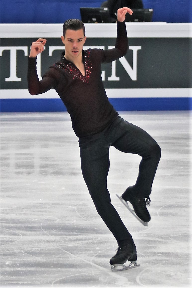 Йорик Хендрикс (Бельгия) на Чемпионате Европы по фигурному катанию 2018.